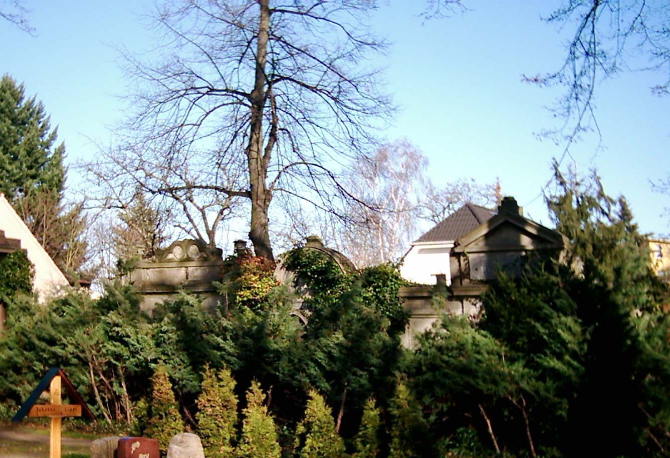 Die derzeit nicht aktive attraktive Erbbegräbniswand von Friedhof Pankow IX